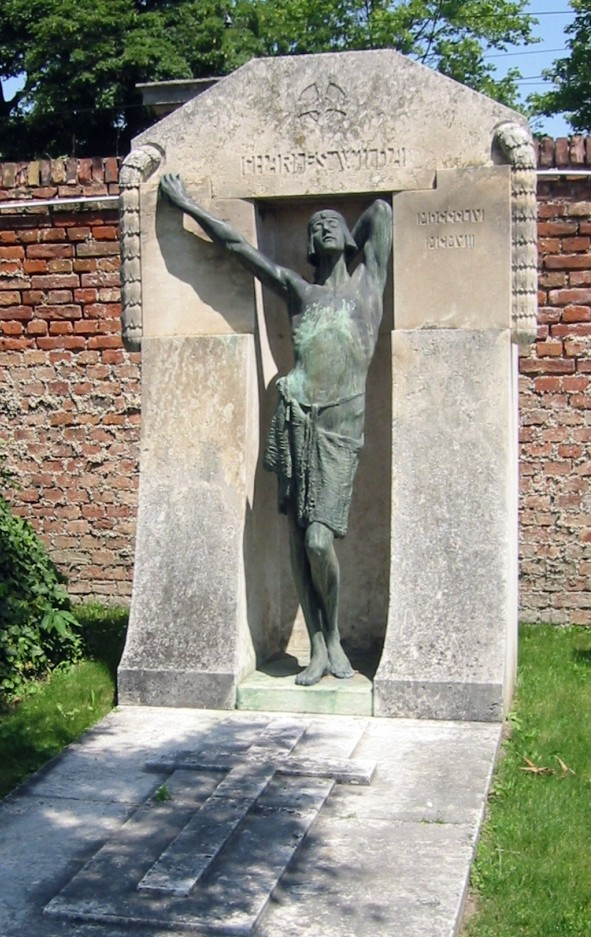 Wiener Zentralfriedhof, Ehrengrab von Charles Wilda, gestaltet von Hella Unger